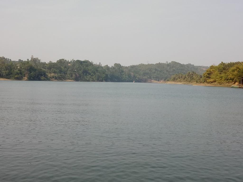 কর্ণফুলি নদী।